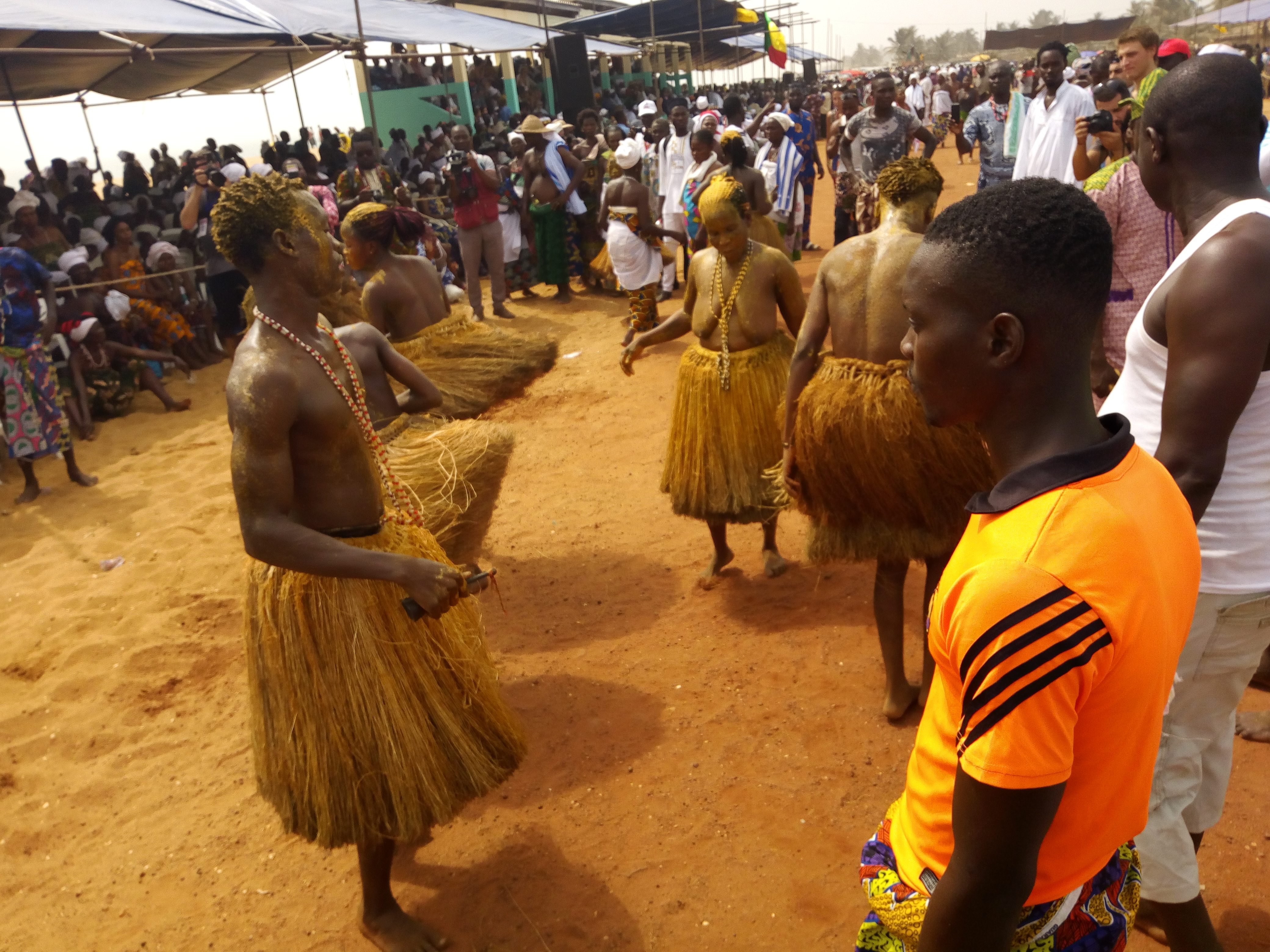 Danse du vodoun cocoussi sur la plage Grand-Popo au Bénin lors de la fête du 10 Janvier 2020. This photo has been taken in the country: Benin